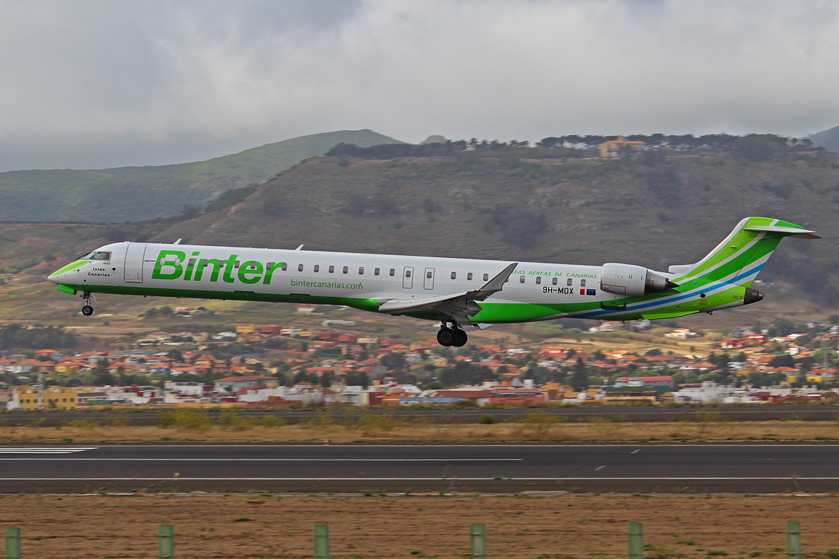 CRJ 1000 de Binter Canarias alquilado a Air Nostrum.